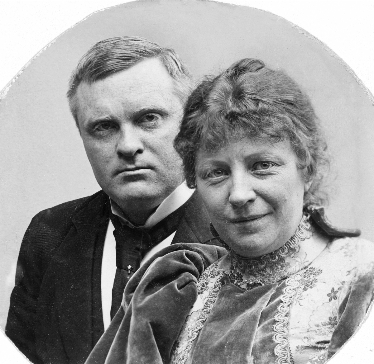 Ekteparet Gina Oselio og Bjørn Bjørnson, fotografert ca. 1910